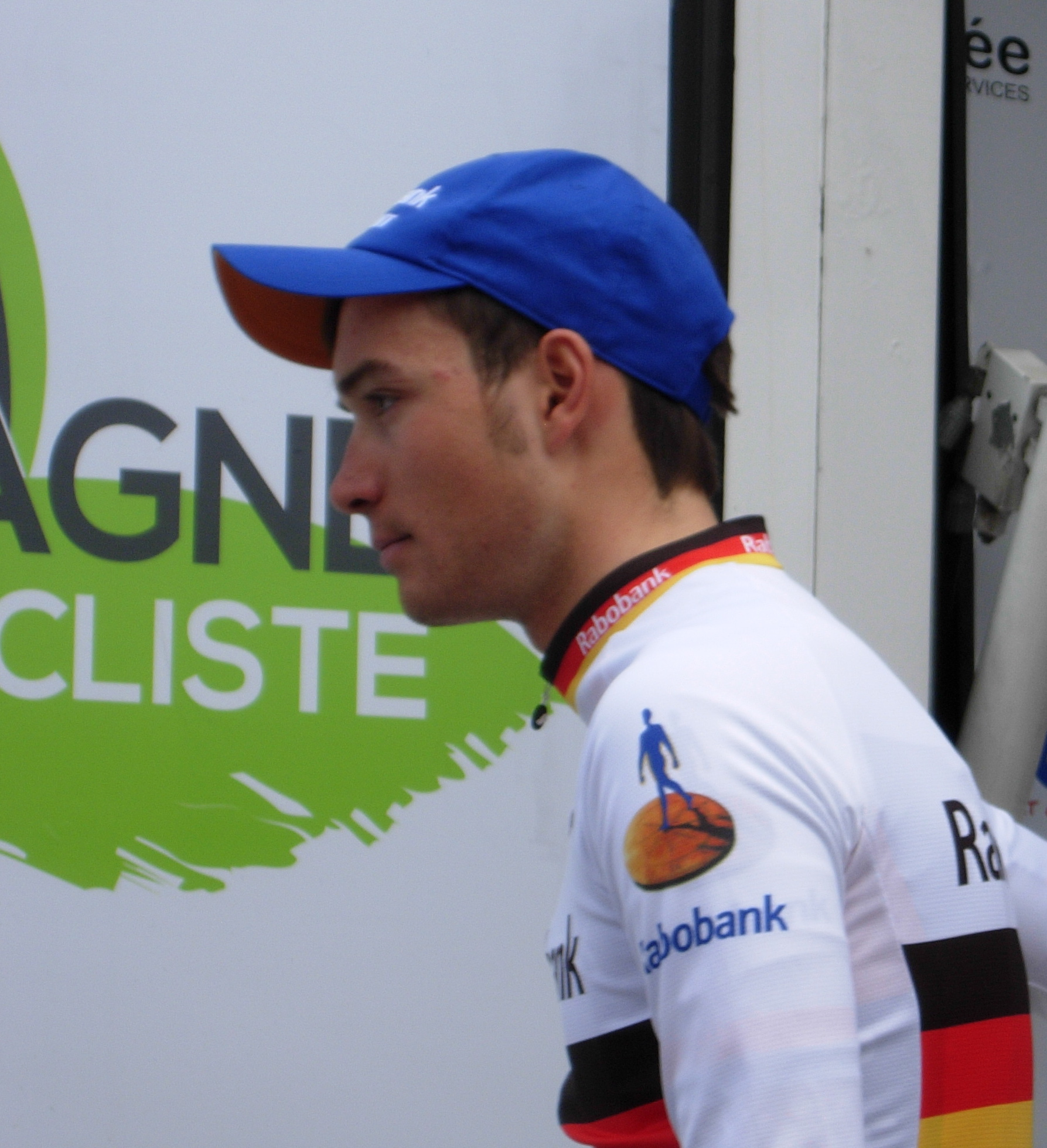 Tour de Bretagne 2013 - Rick Zabel lors de la présentation des équipes au départ de la deuxième étape à Ploemel